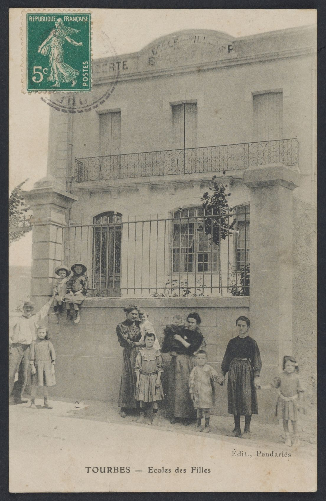 Tourbes. - École des filles : carte postale.